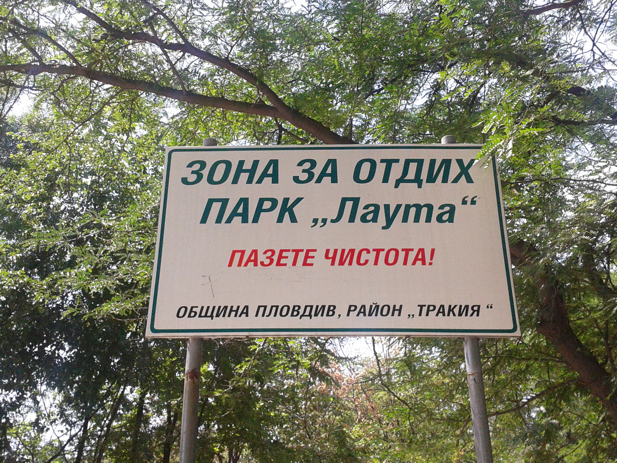 Парк Лаута - гр. Пловдив